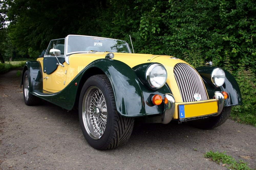 Morgan +8 vun der Säit Morgan